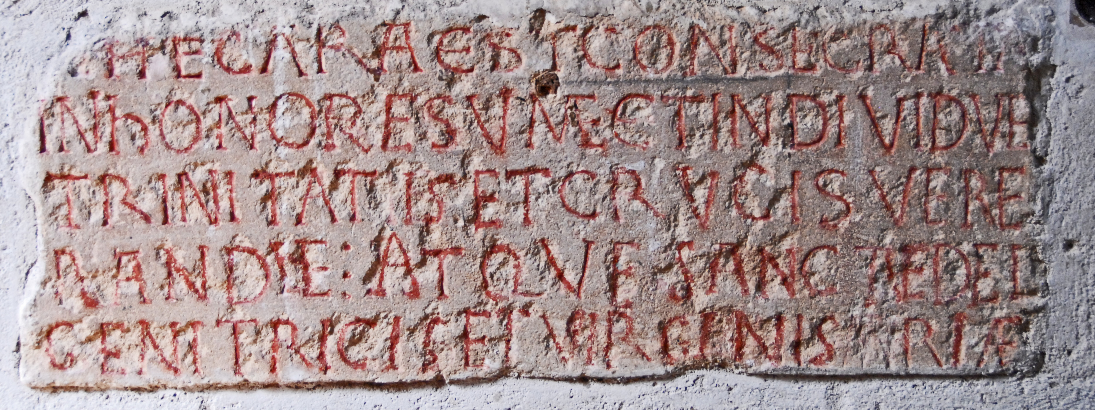 lat. Inschrift